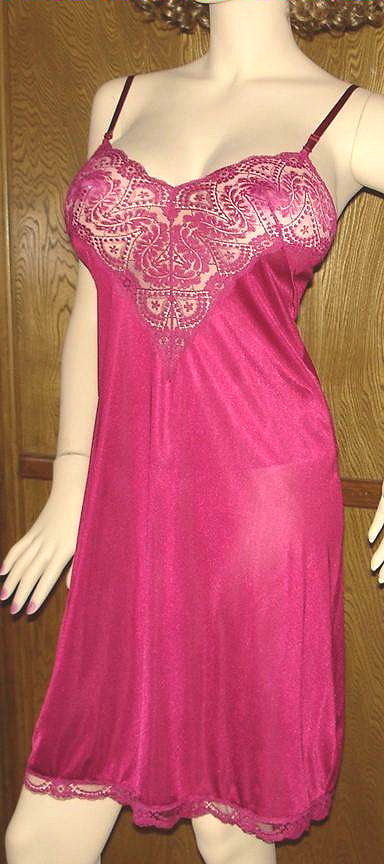 full slip